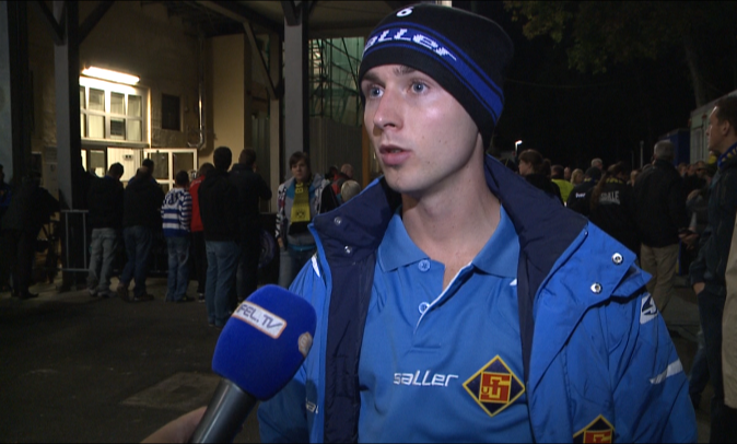 Deutscher Fußballspieler.